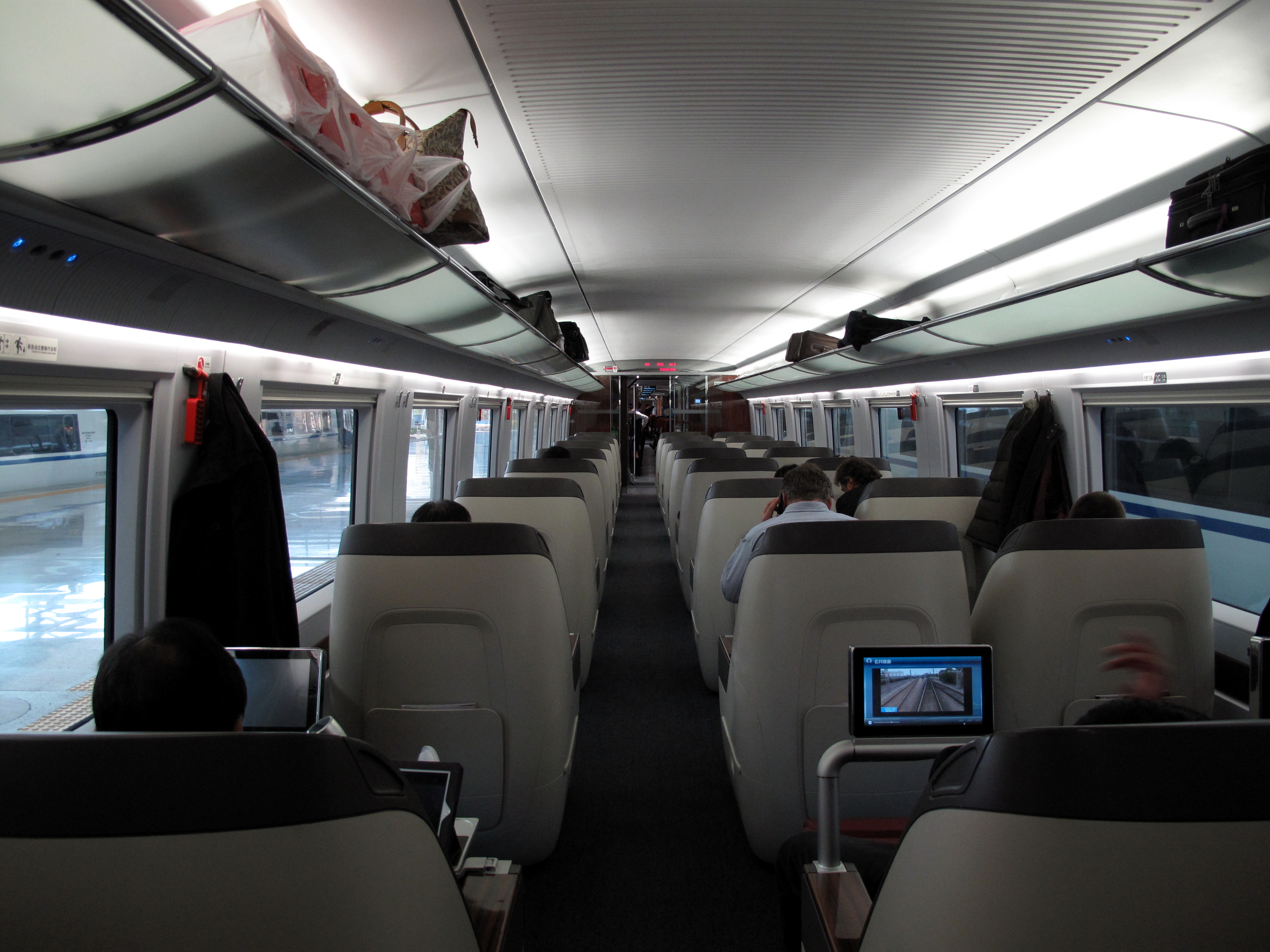 中文（中国大陆）: CRH380BL商务车（SW）车厢